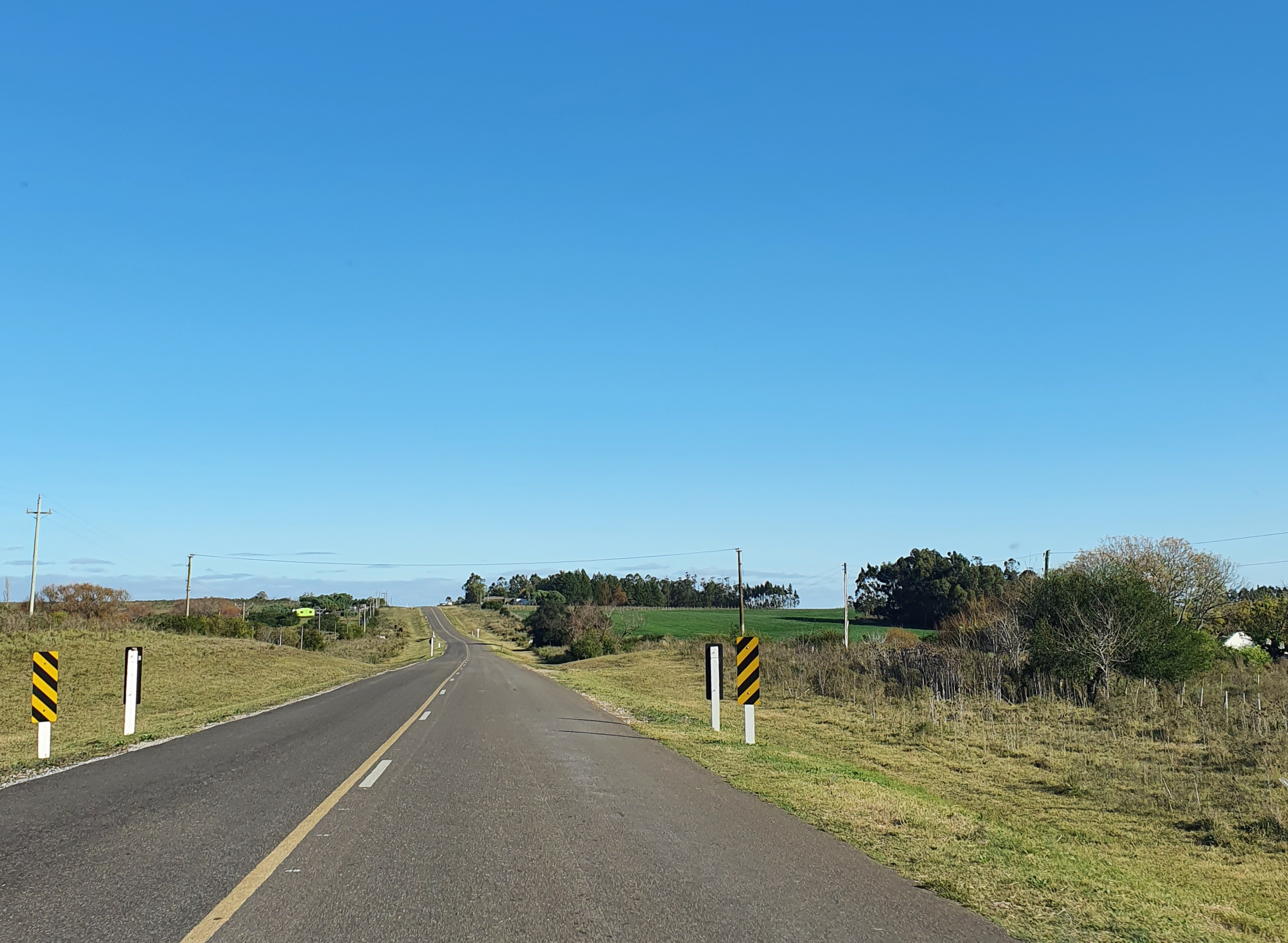 Ruta 108 hacia el sur, Canelones, Uruguay.